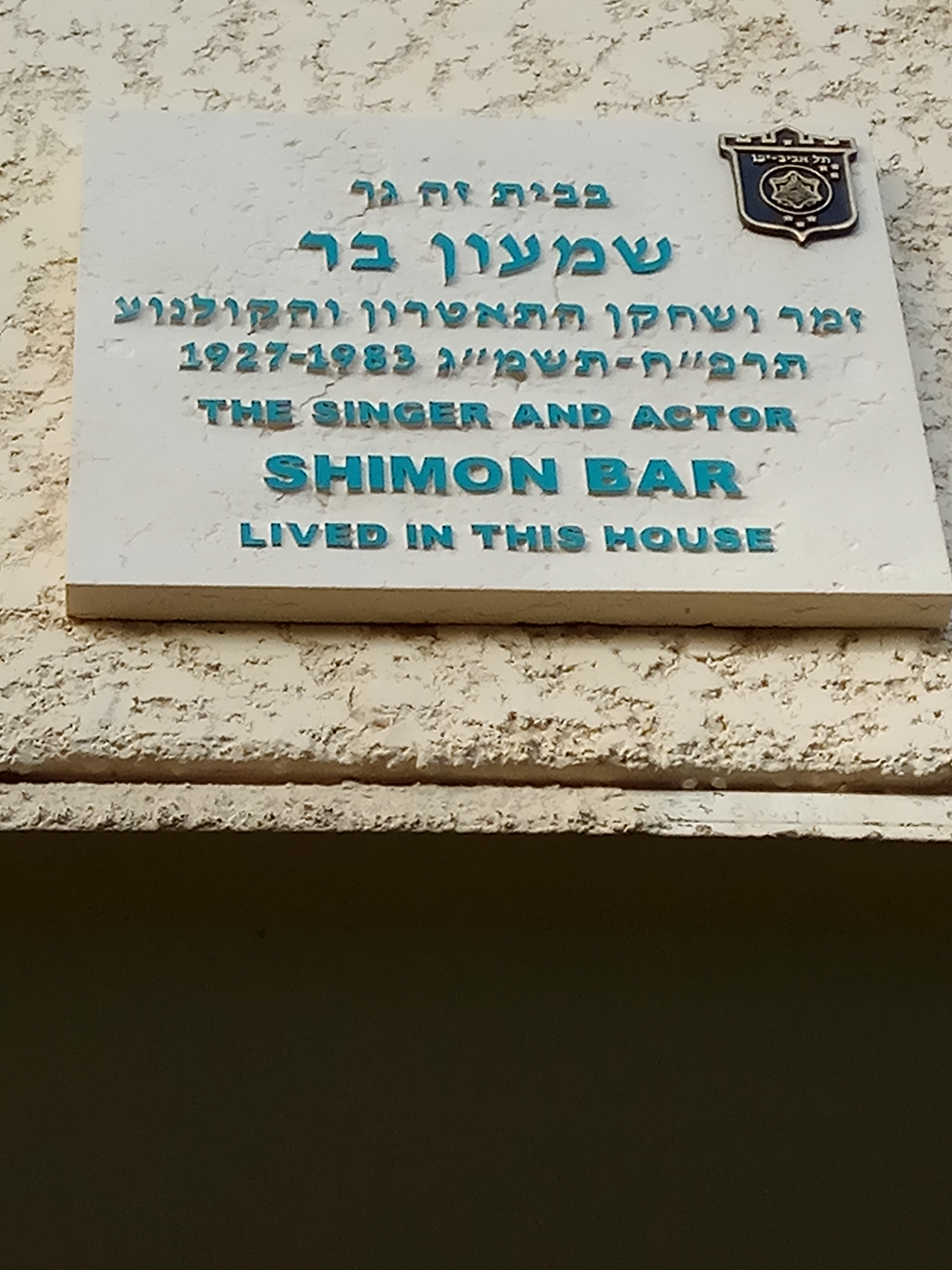 לוחית זיכרון בכניסה לביתו של שמעון בר בכיכר היל 3 בתל אביב